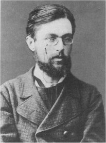 Валериан Андреевич Осинский - русский революционер-народник. один из основателей организации "Земля и Воля"